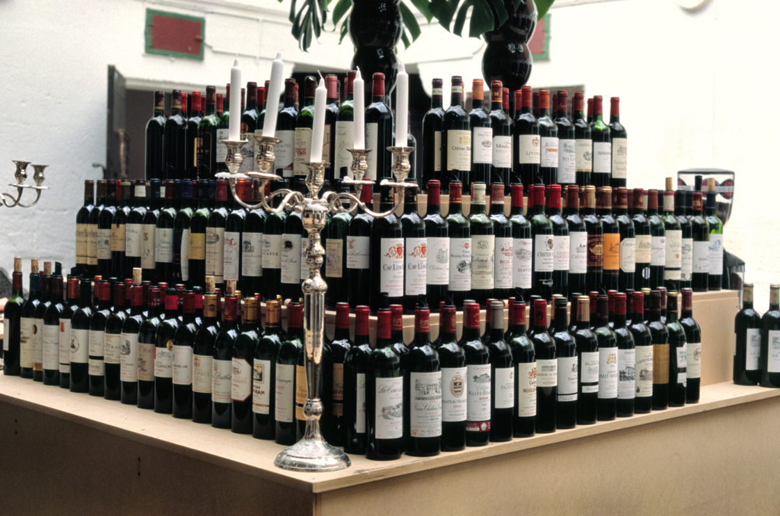 Bordeaux Crus Bourgeois Wines at Château Malleret, April 2008